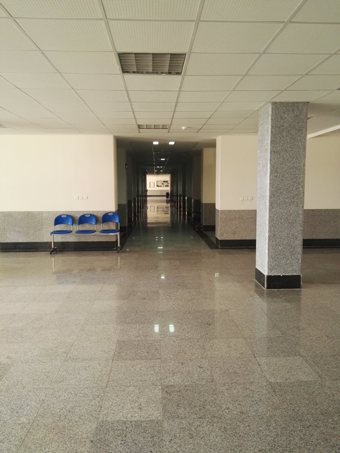 لابی دانشکده کامپیوتر دانشگاه شاهرود